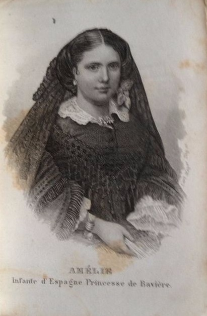 Amalia del Pilar de Borbón 1834-1905 Amalia del Pilar von Spanien Amalia del Pilar Burbon en: Infanta Amalia Felipina del Pilar of Spain (1834-1905)